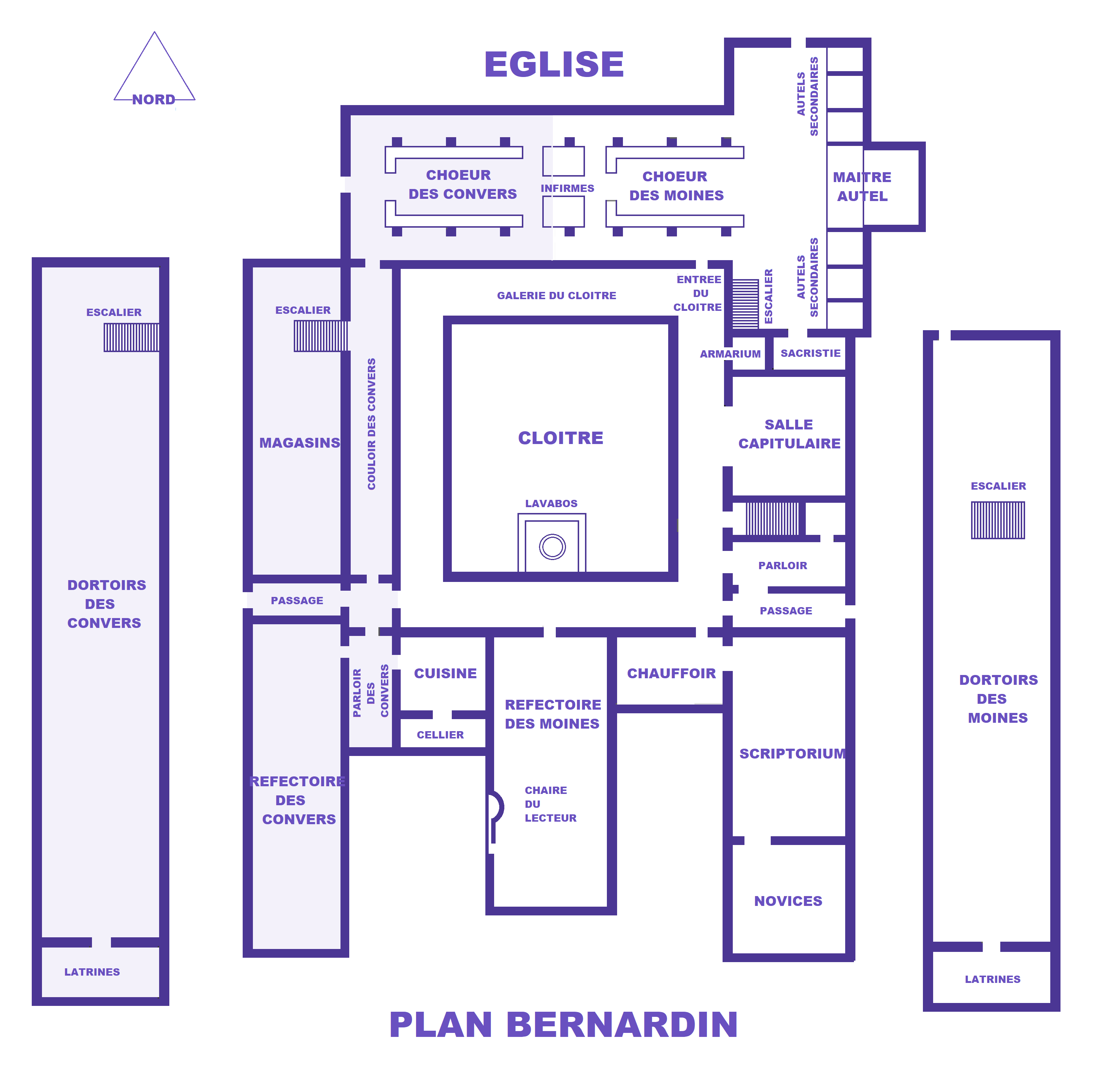 Plan bernardin (image Commons modifiée)